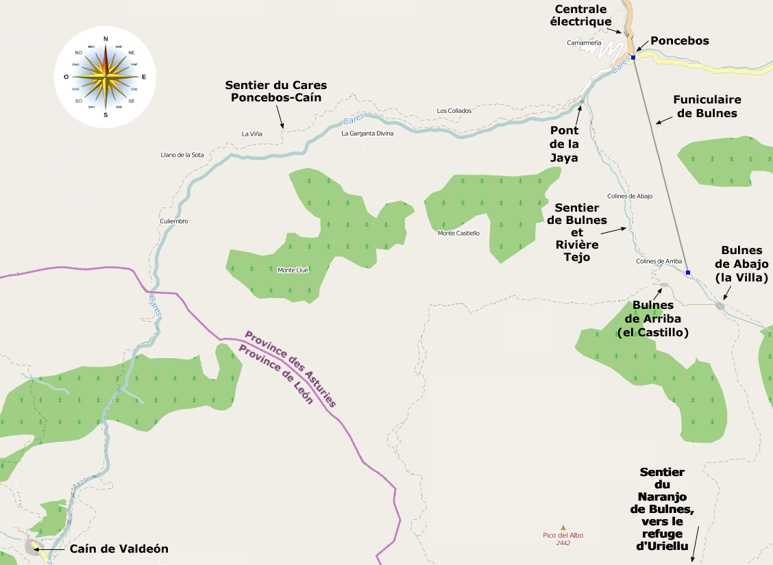 Carte du Sentier du Cares, de Bulnes, du Funiculaire de Bulnes